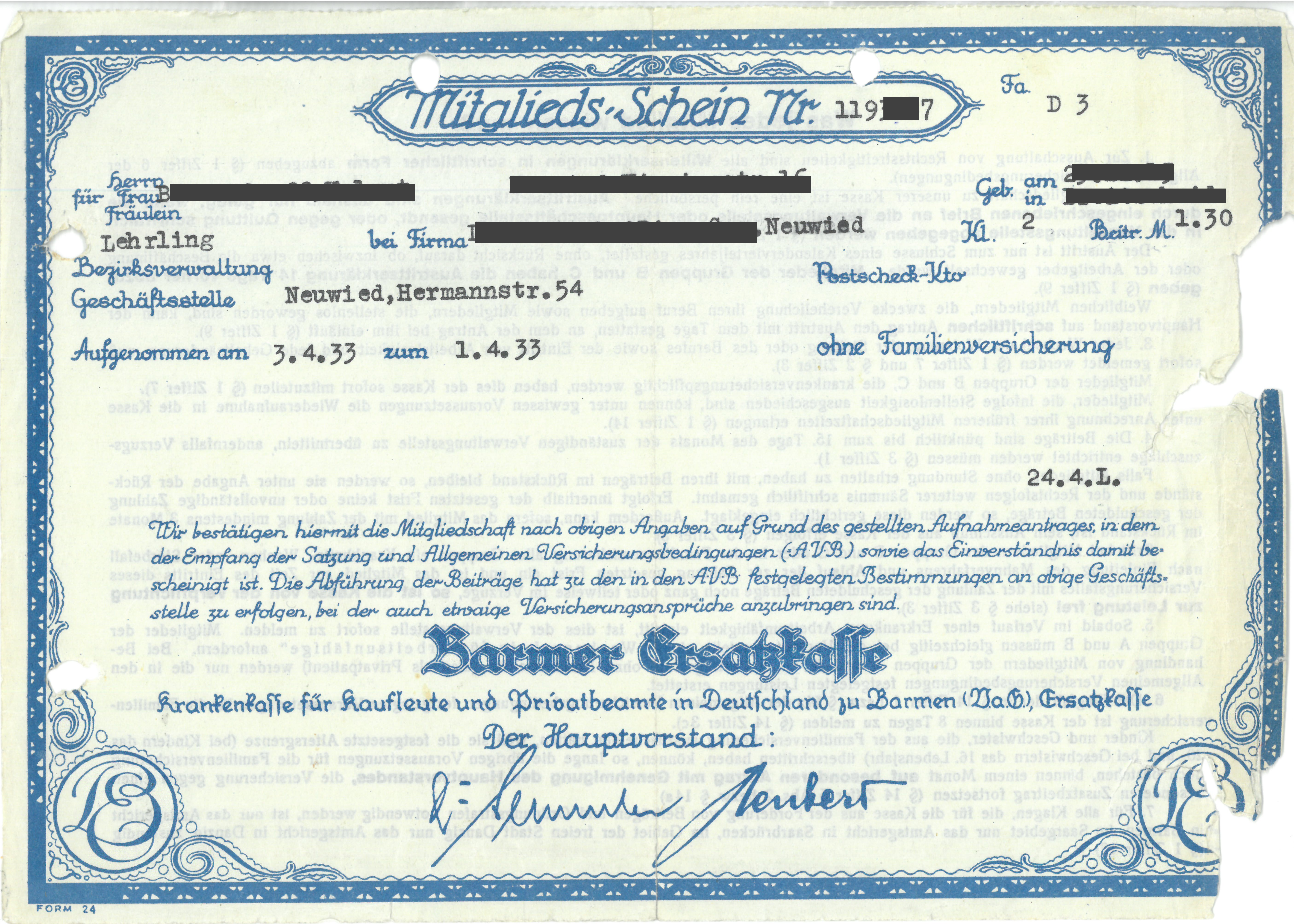 Mitgliedsschein der Barmer Ersatzkasse, 1933